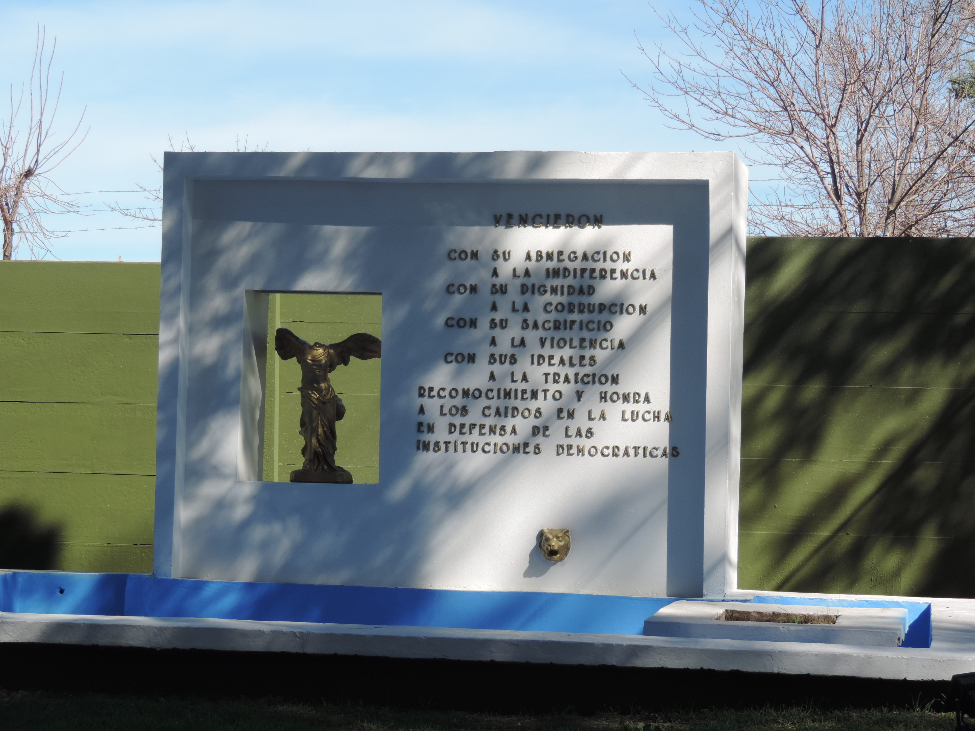 Fotografía del predio donde funcionó el 300 Carlos, centro de detención y tortura de la dictadura uruguaya